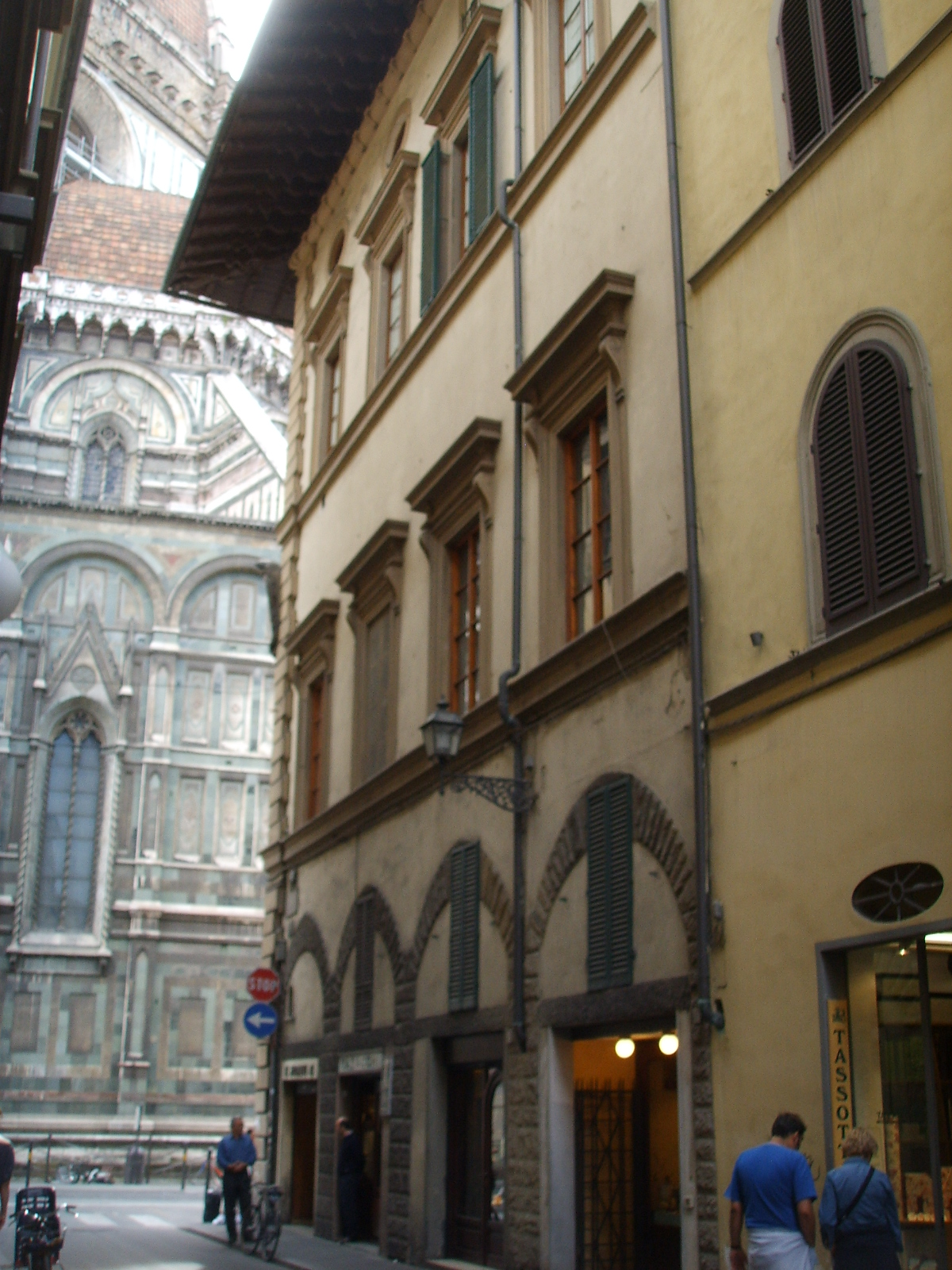 Casa Ghiberti in Florence